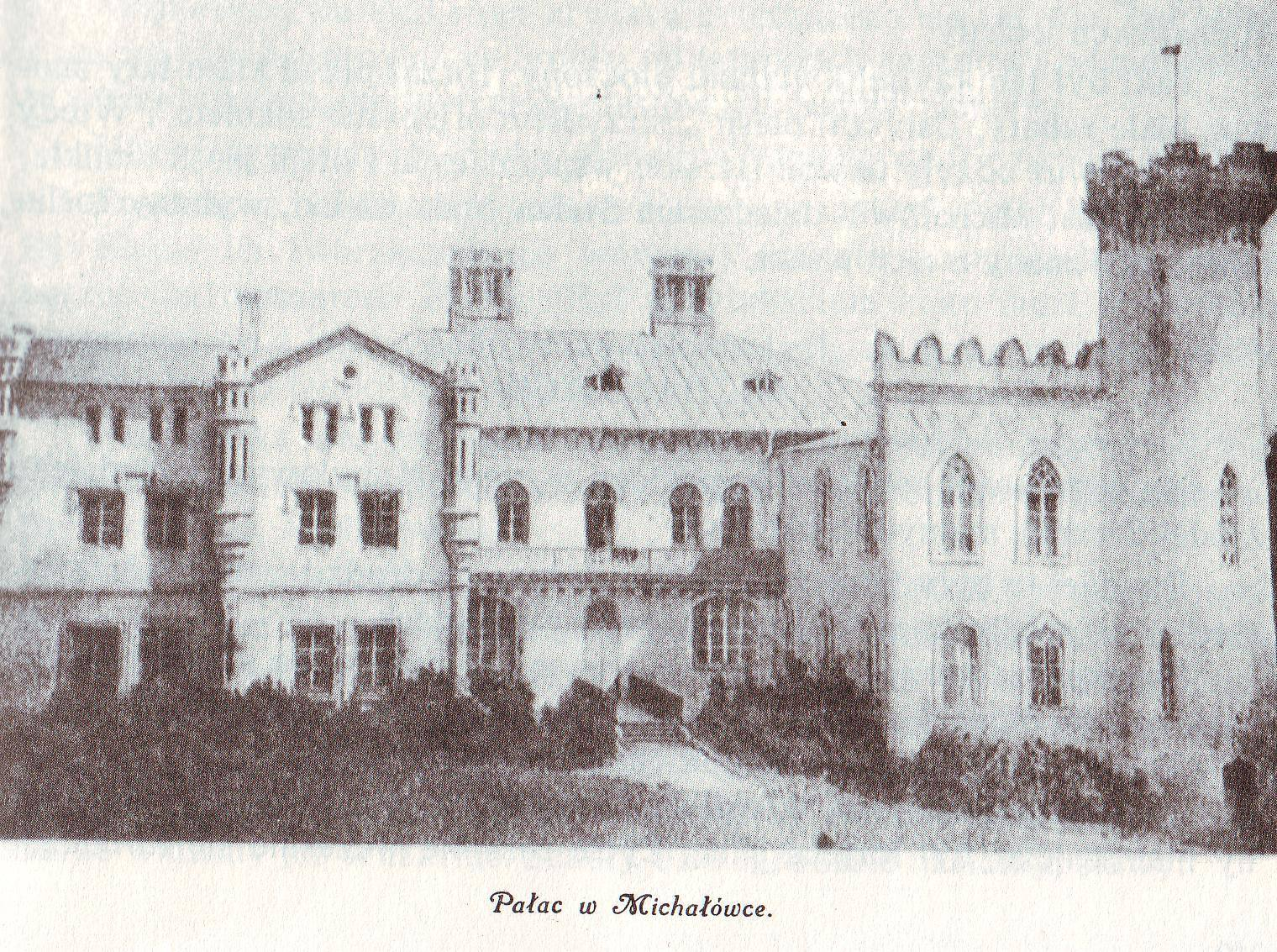 Michałówka - pałac Makowieckich